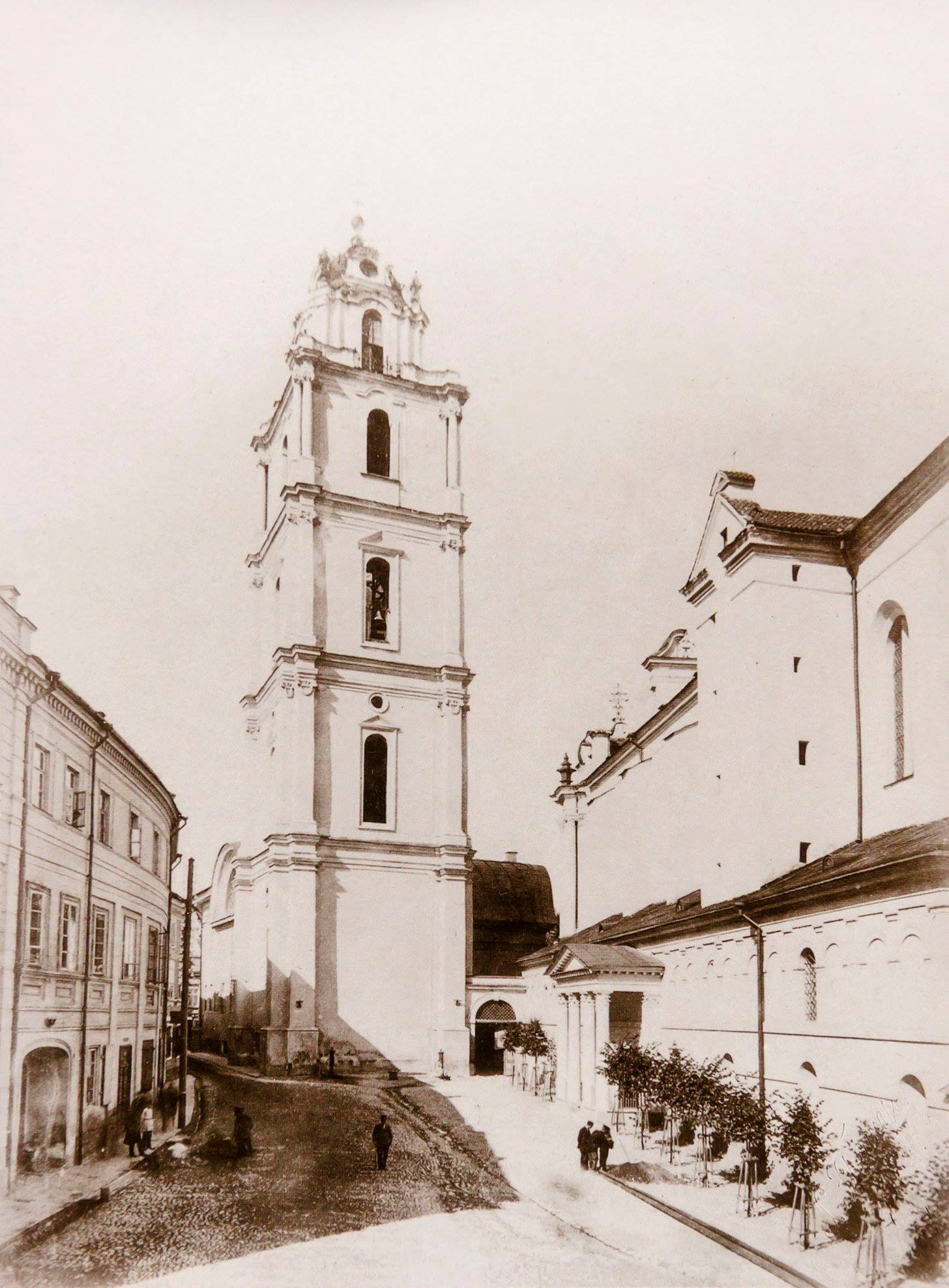 Беларуская (тарашкевіца): Вільня (Vilnia), вуліца Сьвятаянская (vulica Śviatajanskaja). Касьцёл Сьвятых Яна Хрысьціцеля і Яна Апостала і Эвангеліста